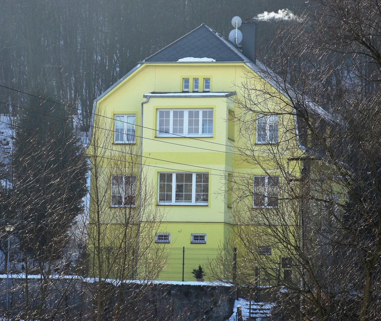 Villa Eben - Kostelní Dvůr (Kadaň), Pokutická 826.